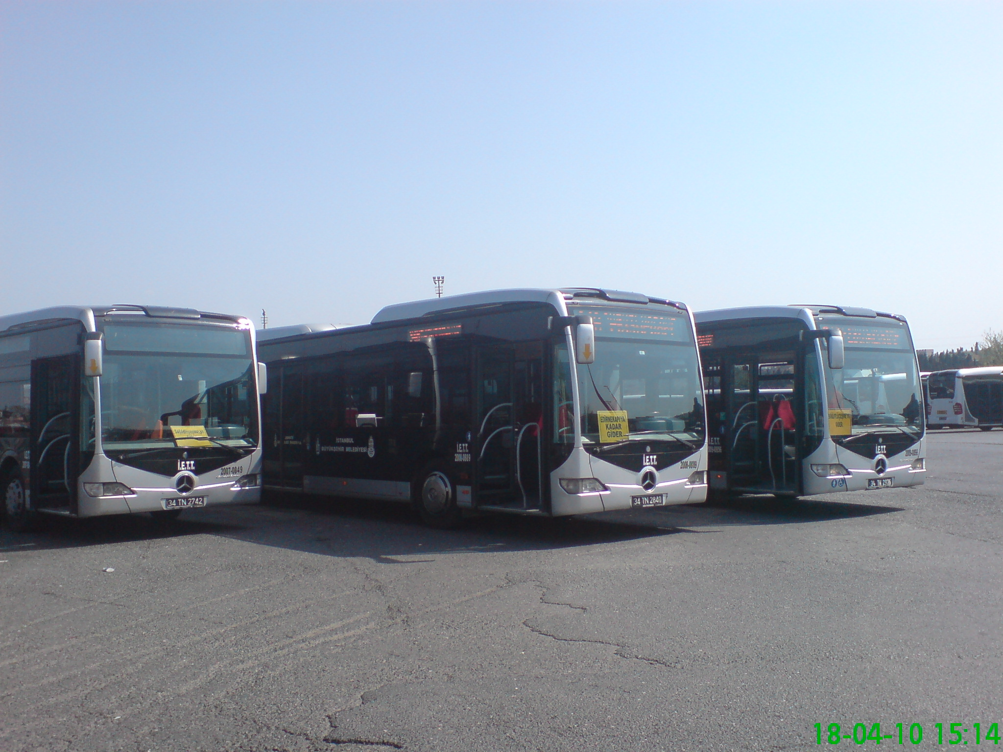 Metrobüste bulunan siyah otobüsler.